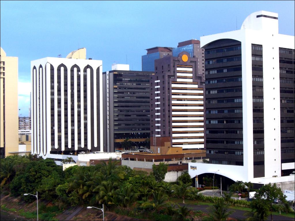 Edifícios na Av. Tancredo Neves vistos a partir do Salvador Shopping, Salvador, Bahia, Brasil.